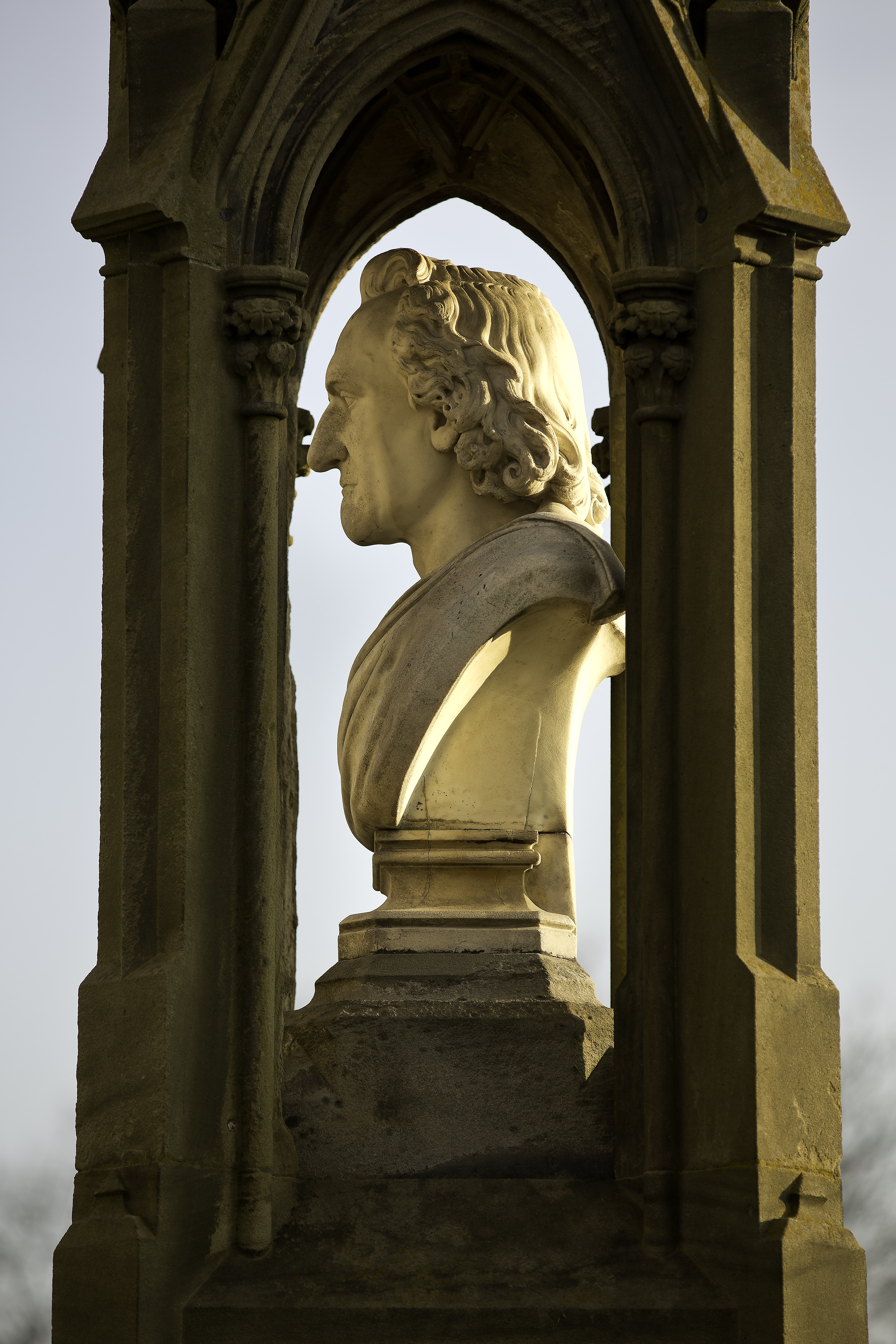 Stele mit Marmorbüste von Carl Alexander Heideloff